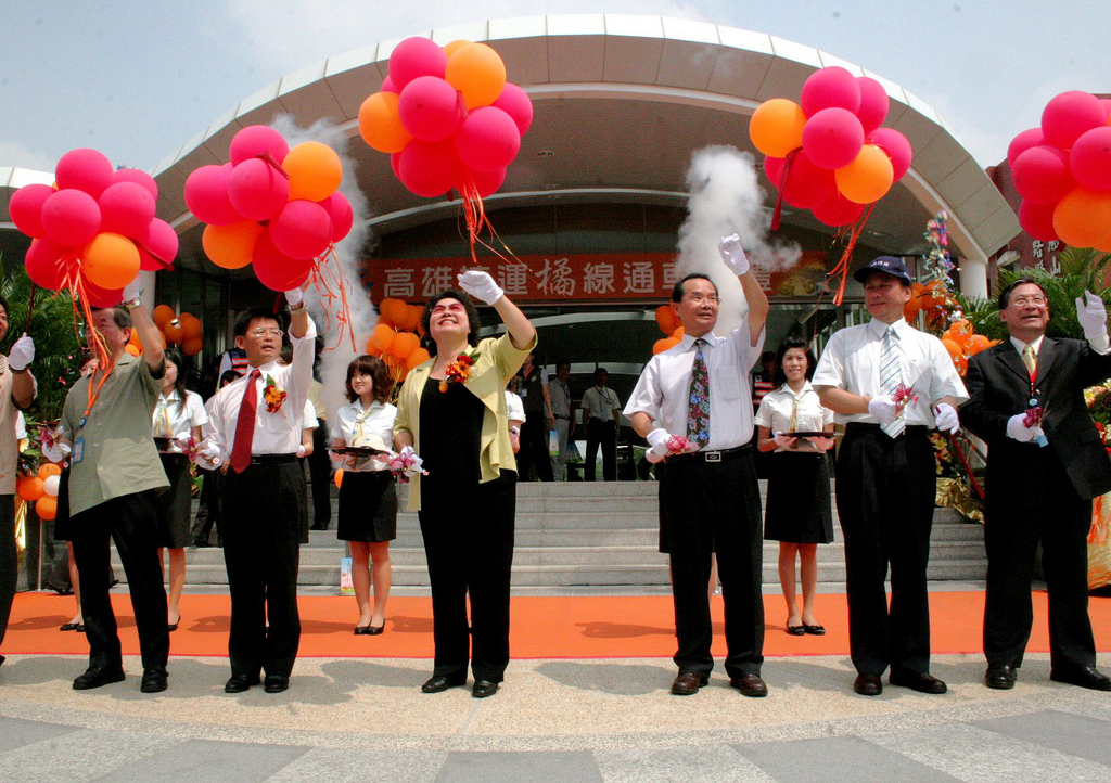 2008年9月21日，高雄捷運橘線通車營運典禮於大東站舉行。前排左一至左三：謝長廷、楊秋興、陳菊。